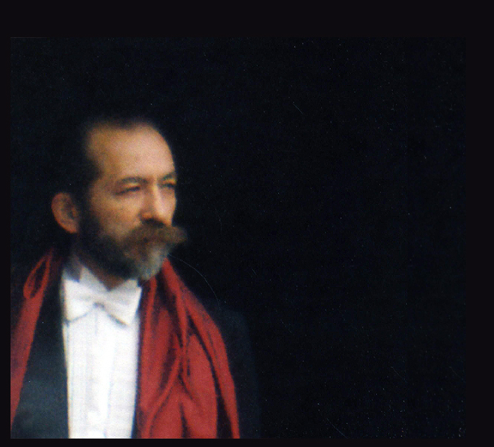 Кадр из фильма «Рождение музыки.» В роли Творца — композитор Сергей Осколков